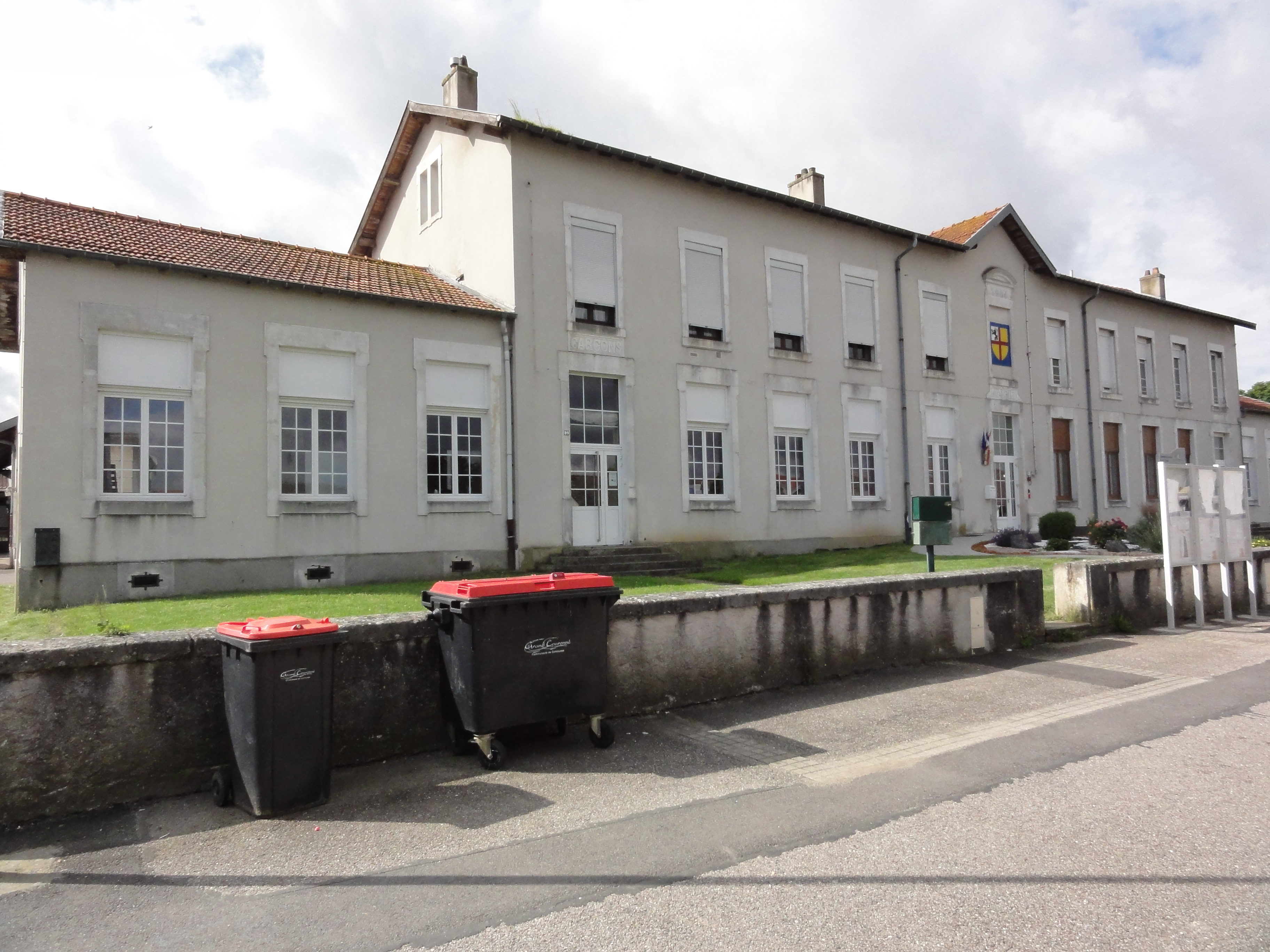 Haraucourt (M-et-M) mairie - écoles